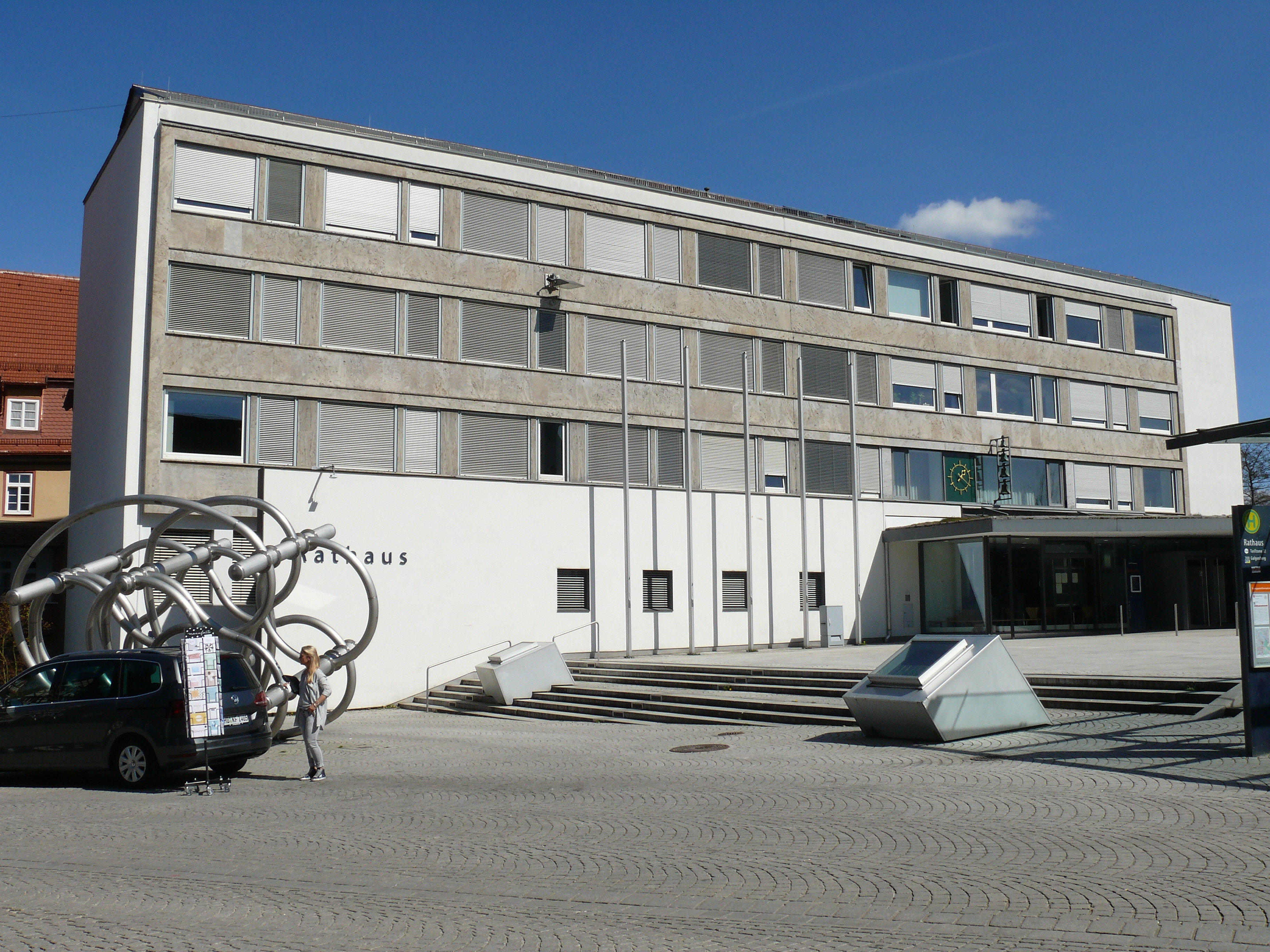 Das (neue) Rathaus in Waiblingen.